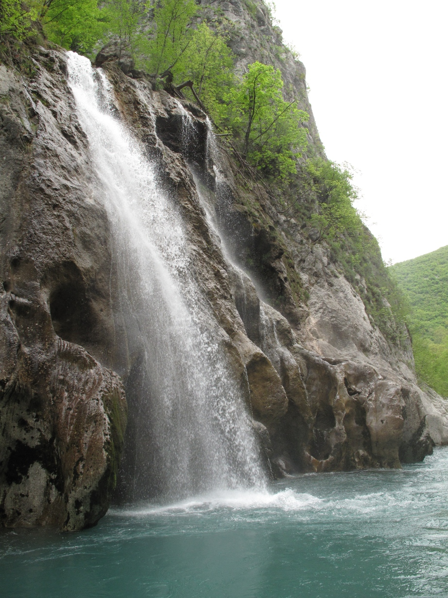 Pad Šištice u Neretvu